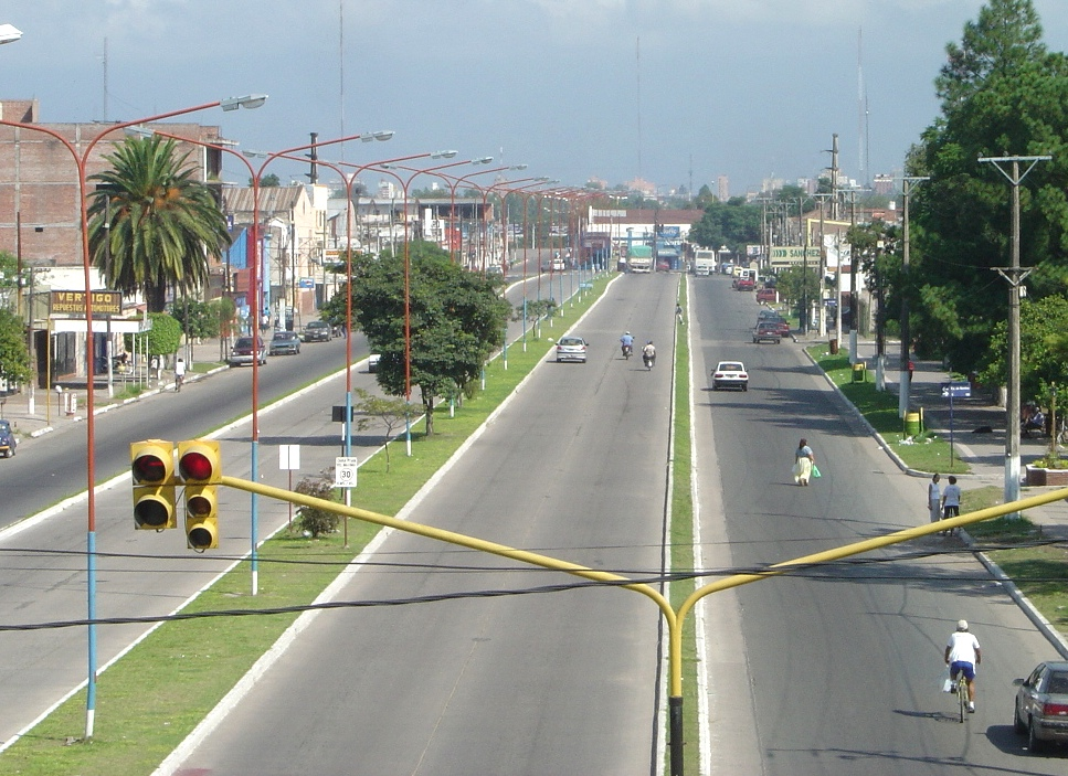 Monseñor Diaz Avenue, Banda del Río Salí, Tucumán, Argentina